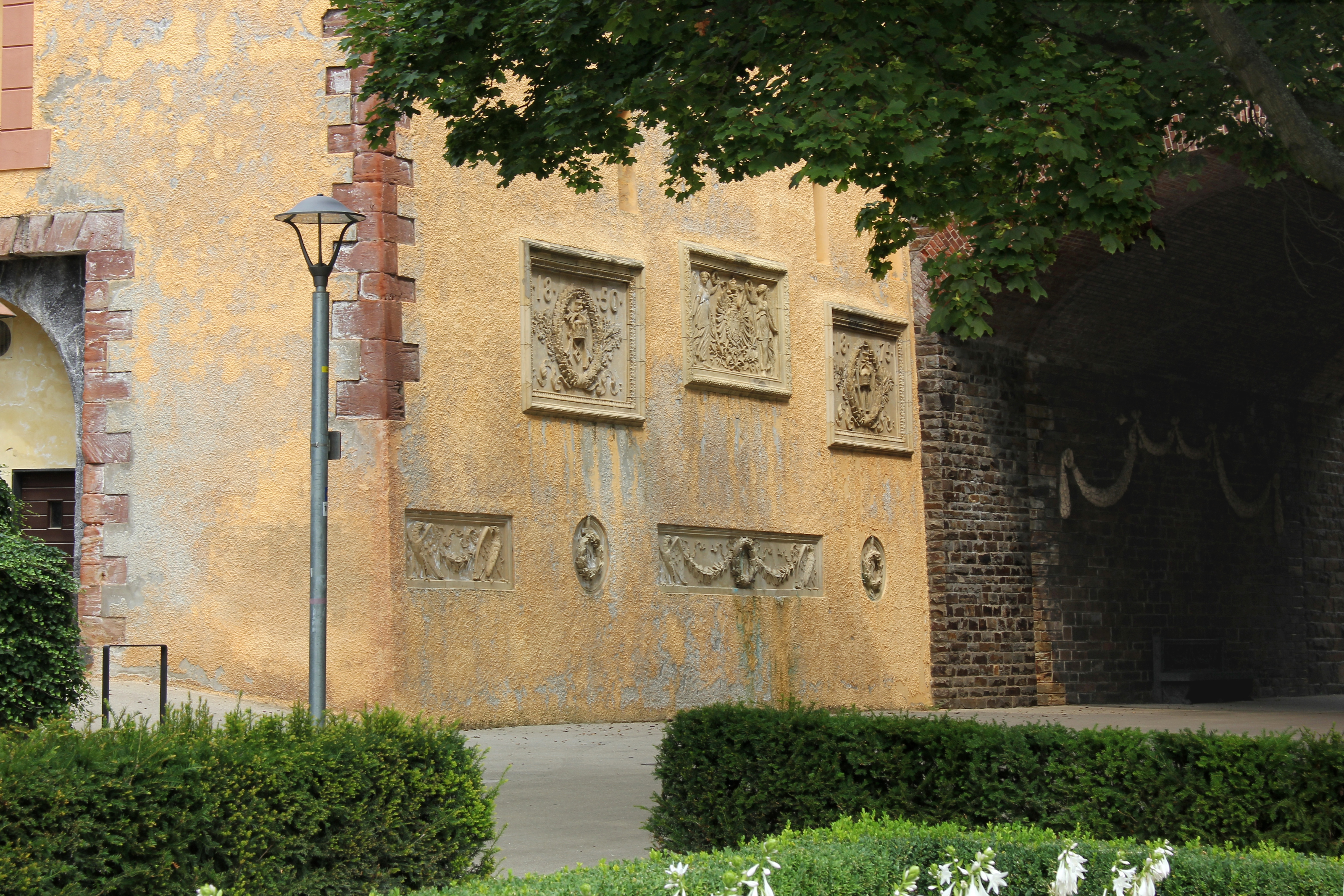 Königshalle in Koblenz, Nordflügel der um 1820 erbauten Rheinschlusskaserne mit Reliefs von 1875 zu Ehren des deutschen Kaiserpaars